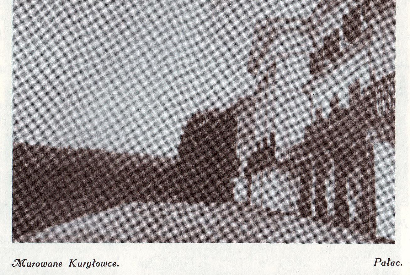 Murowane Kuryłowce